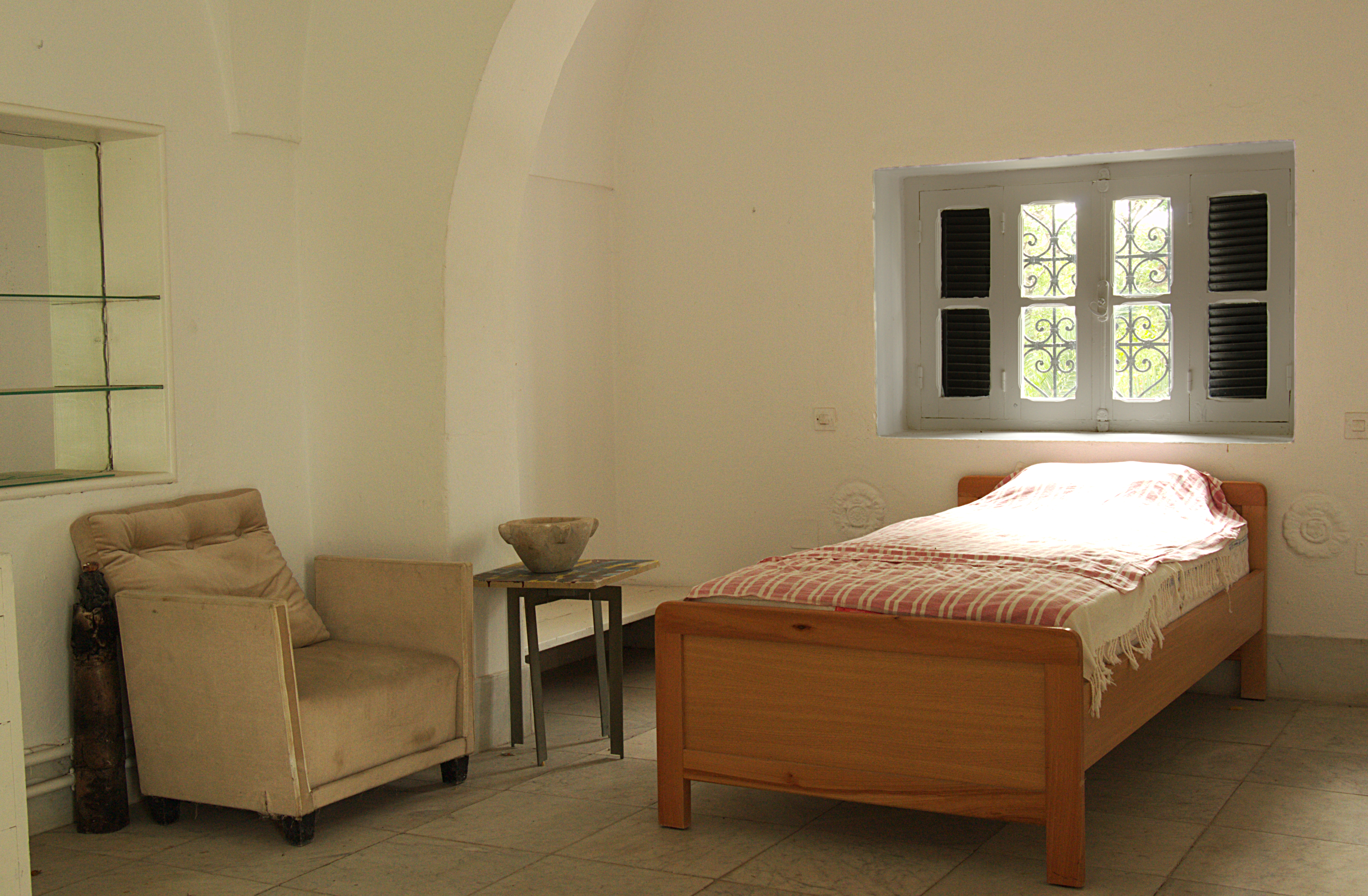 Dar Sébastien et son parc, siège du centre culturel de Hammamet, Hammamet